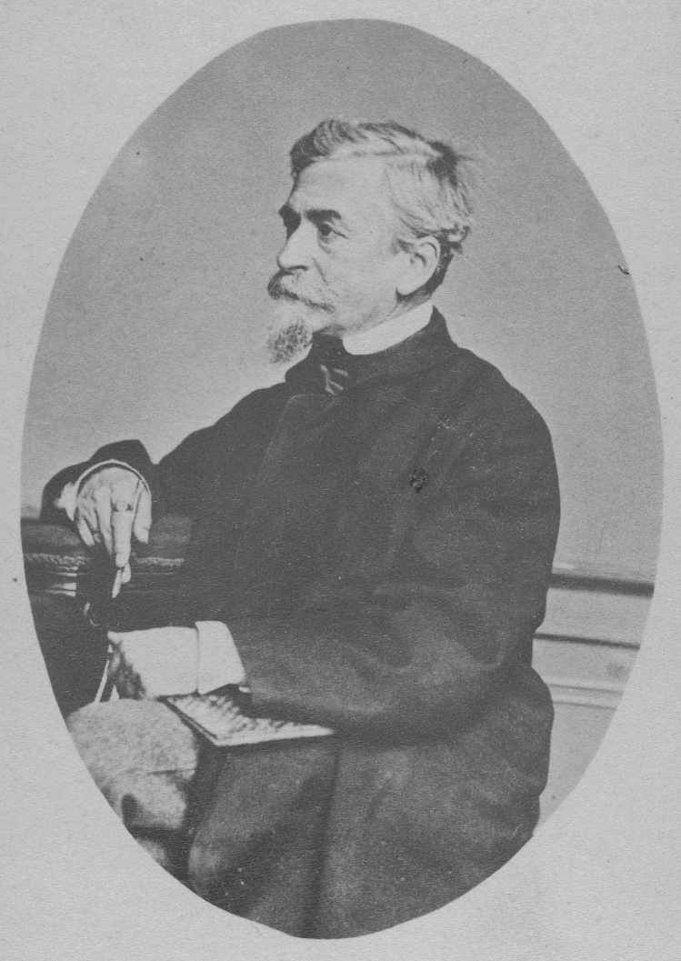 Adam, Benno [Maler 1812-1892] Beschreibung: Kniestück sitzend im Oval Technik: Fotografie Signatur: Hollandiana M. Adam, Benno Bildnummer: ana-000595